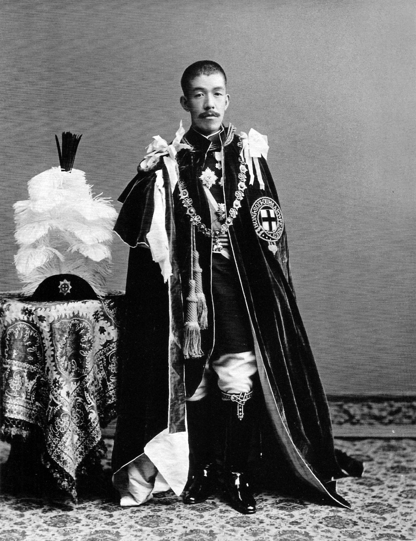 ガーター勲章(Order of the Garter)授章記念